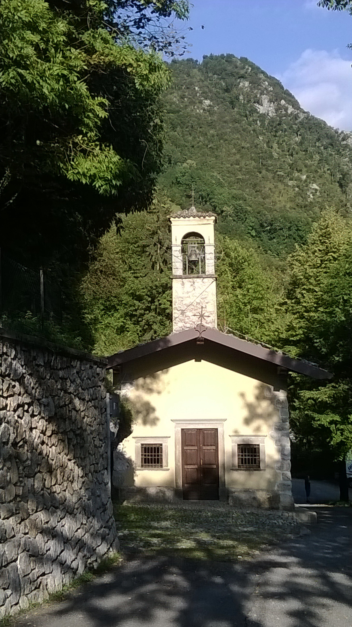 Chiesa Madonna della Neve. Oltressenda Alta, loc.Dosso (BG). Italy